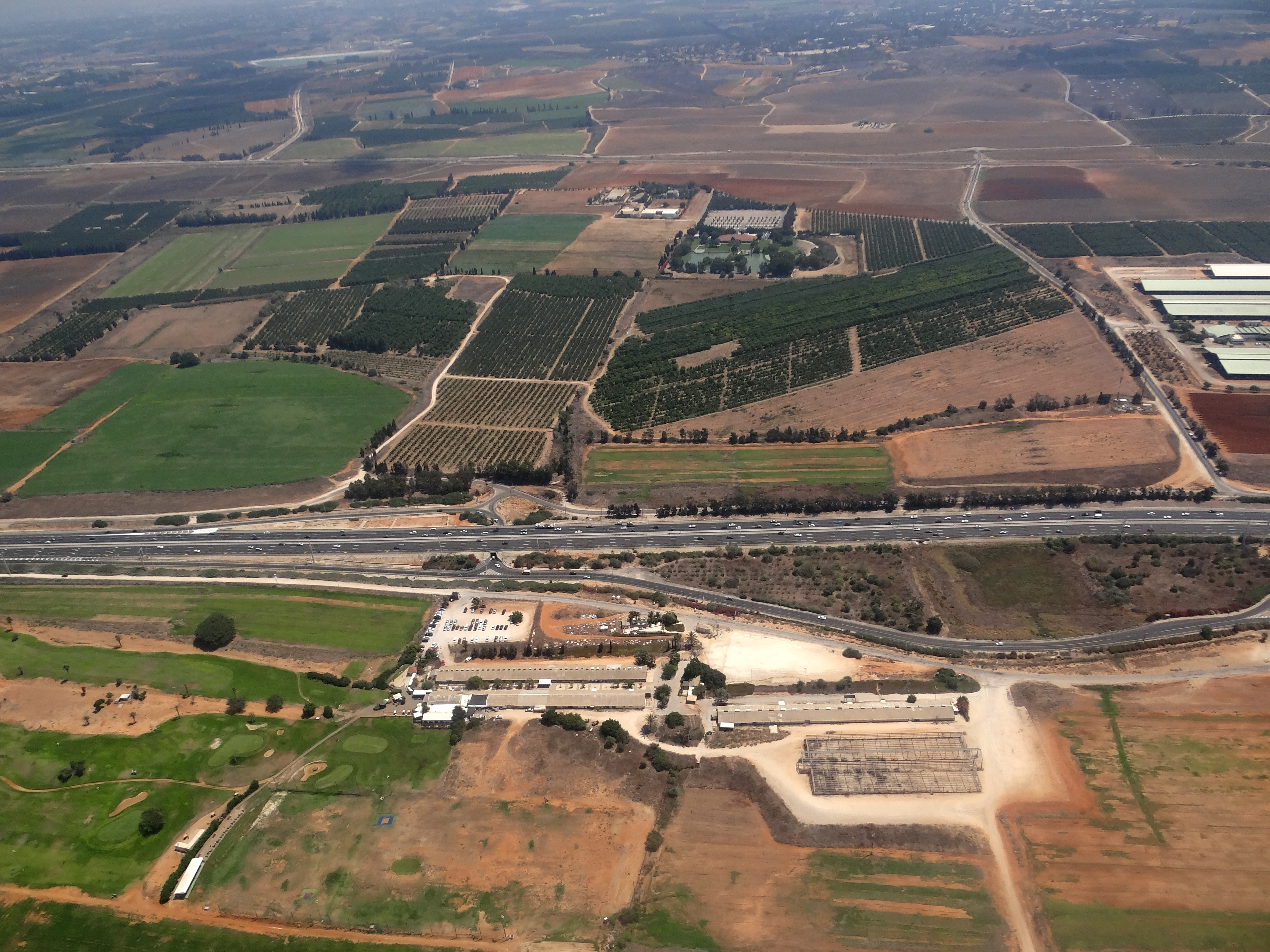 כביש 2 בישראל ליד קיבות געש